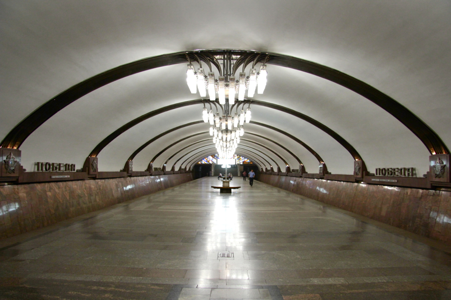 Samara Metro (Самарский метрополитен)